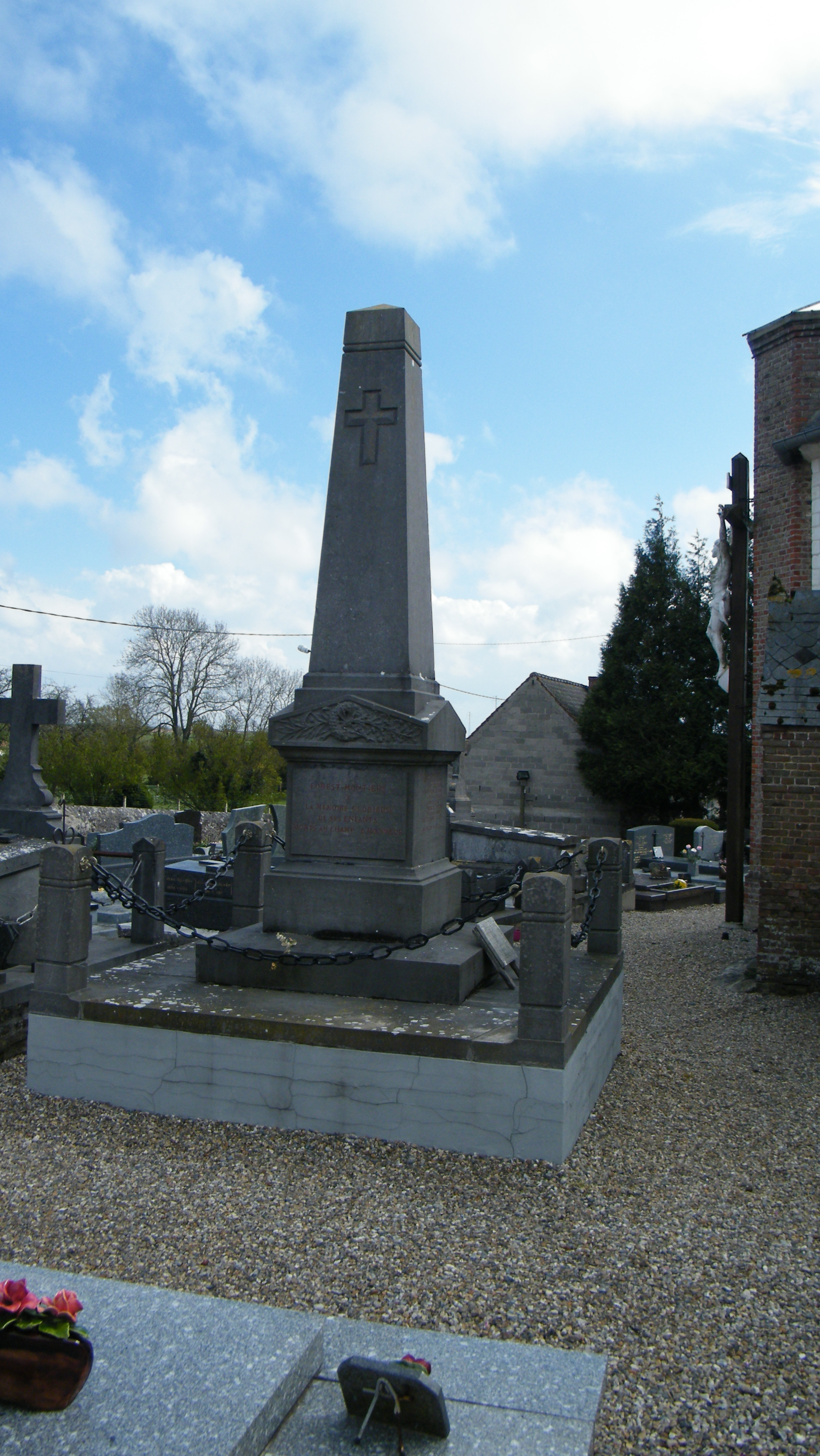 Forest-Montiers, monument aux morts